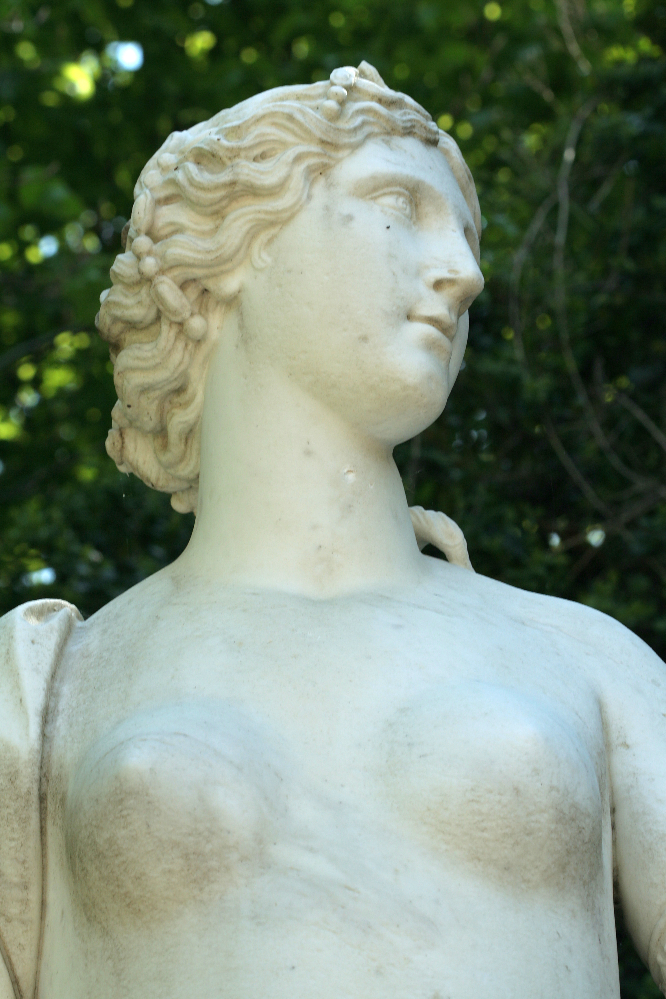 Ino devenue déesse marine sous le nom de Leucothoée, recevant les offrandes des nautoniers dont elle est la protectrice.